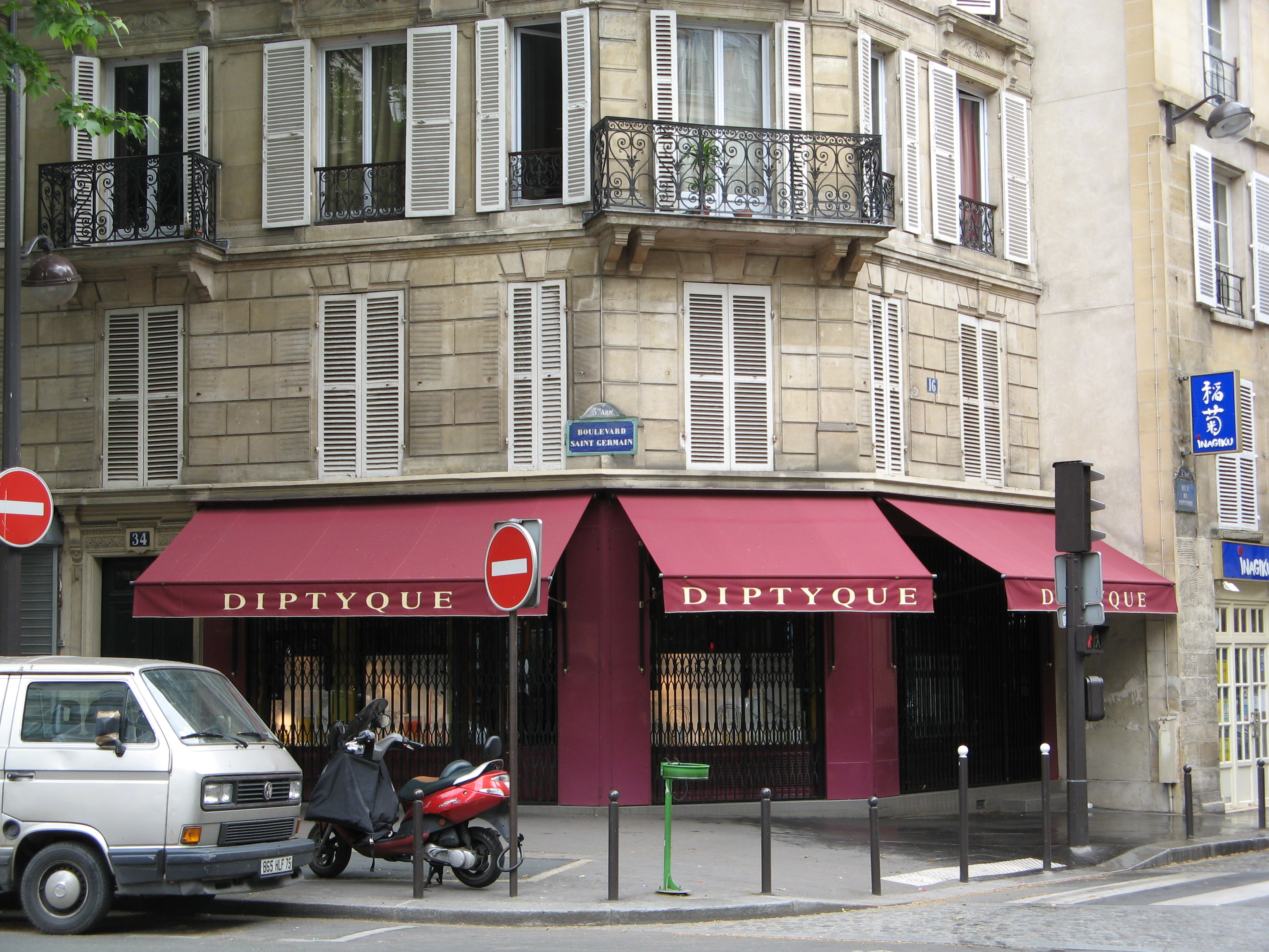 Hauptsitz (Ladengeschäft) der Parfümerie Diptyque, 34 Boulevard Saint Germain, Ve arrondissement, Paris, France.